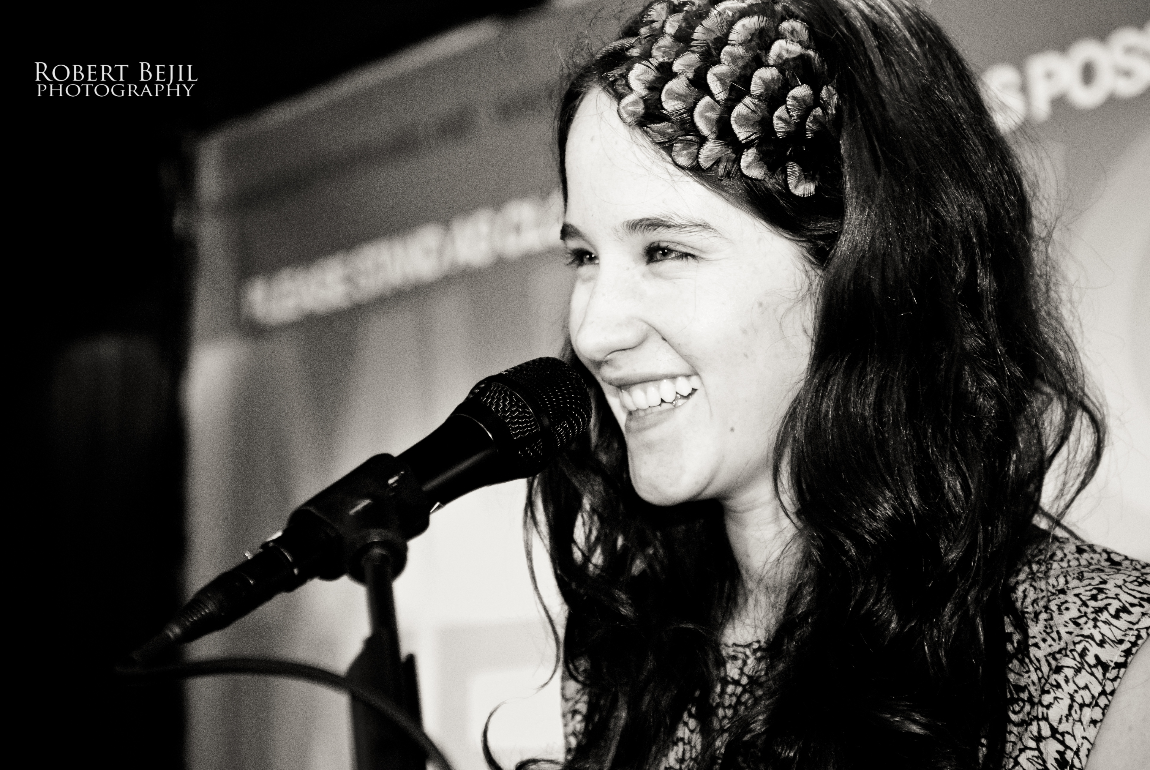 Ximena Sariñana live @ La Cita Bar. Los Angeles, California 02/16/11